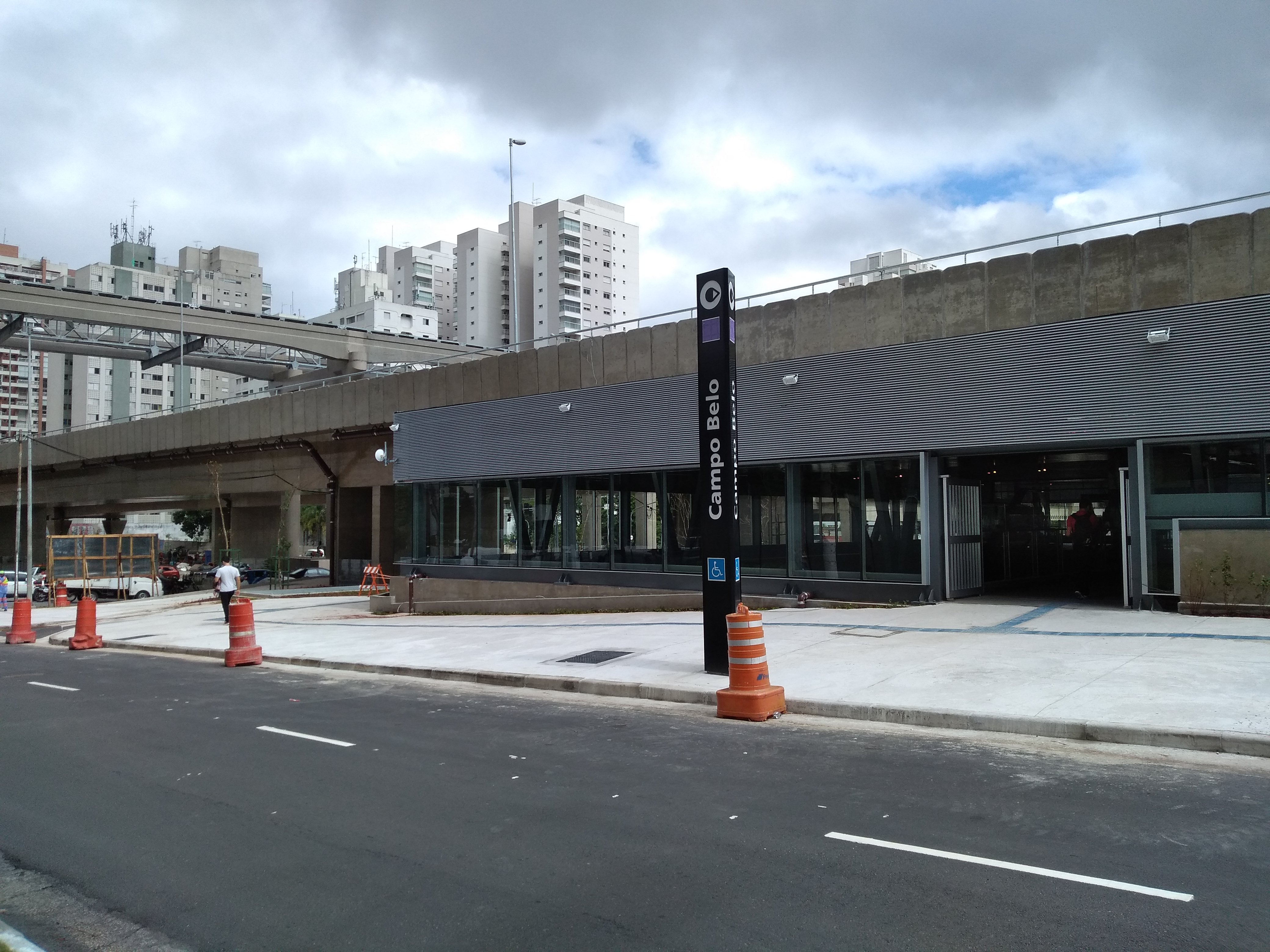 Entrada Leste da Estação Campo Belo da Linha 5 Lilás do Metrô São Paulo, 2 dias depois da inauguração